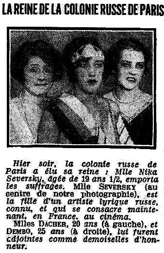 L'élection de la Reine de la Colonie russe de Paris 1928.